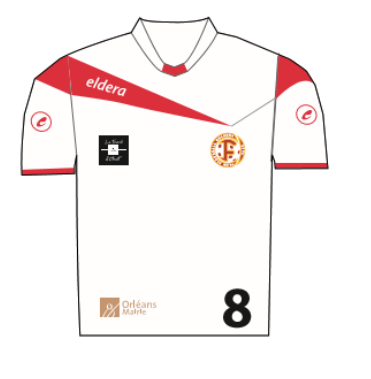 cfoaway2016